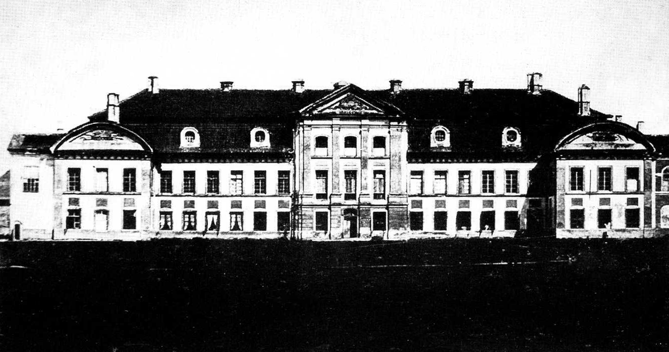 Заслав.Палац Санґушків. Парковий фасад.